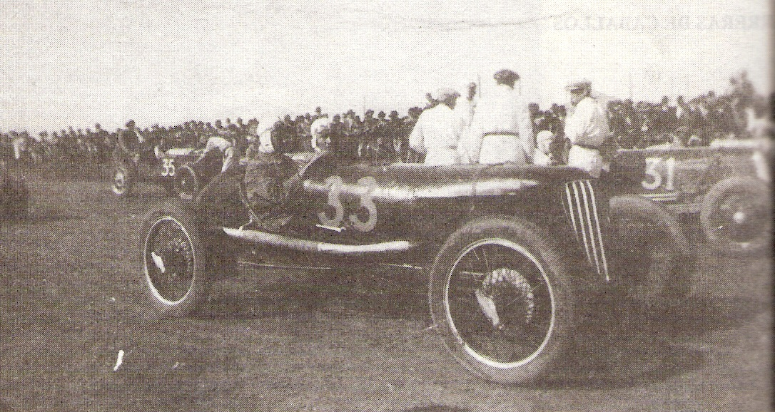 Automovilismo de epoca